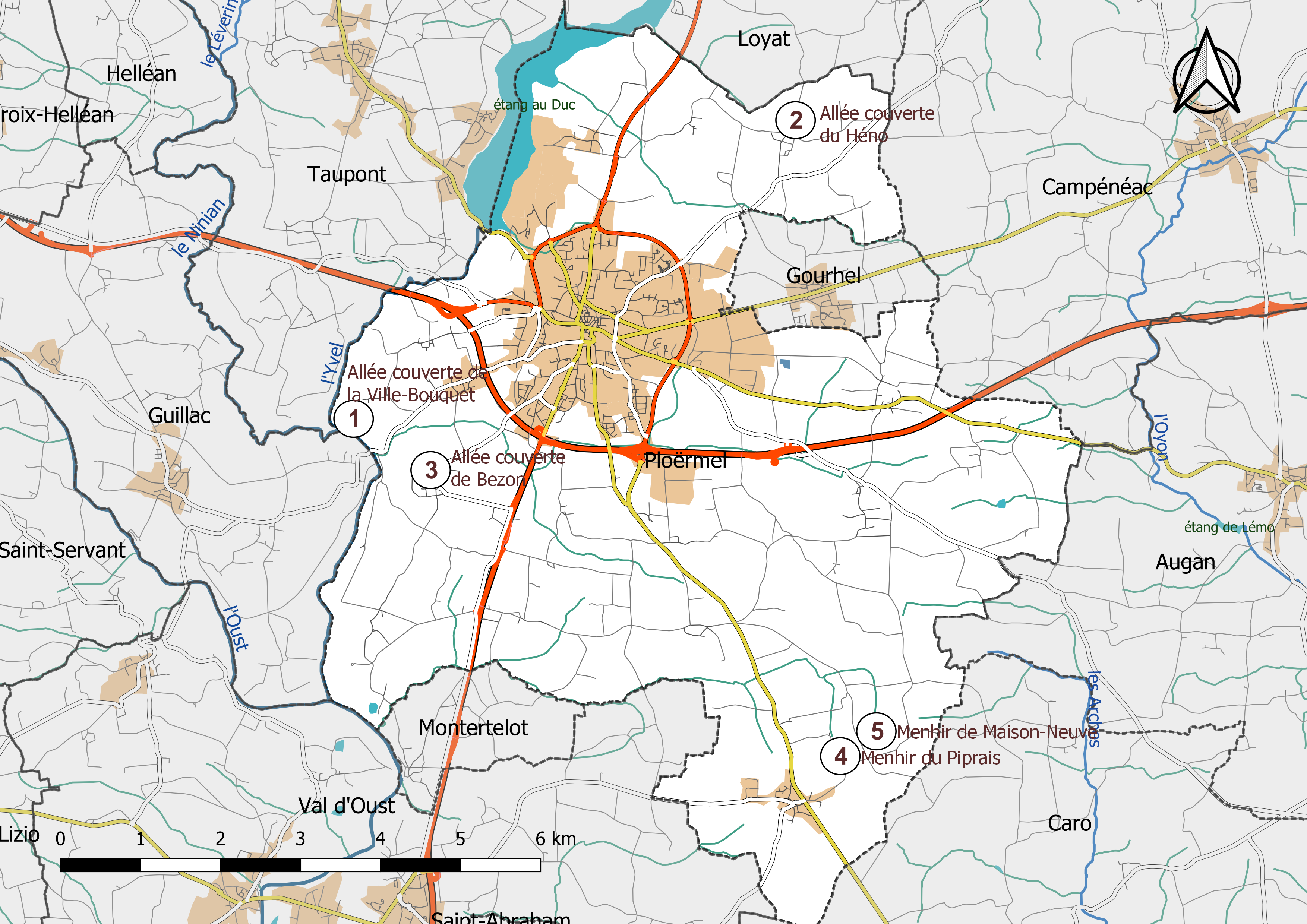 Carte de localisation des mégalithes de la commune de Ploërmel (France).